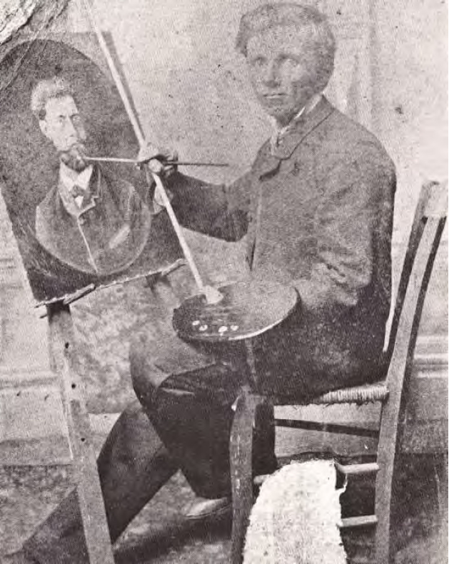 Pietro Stangherlin (à direita) com um amigo.